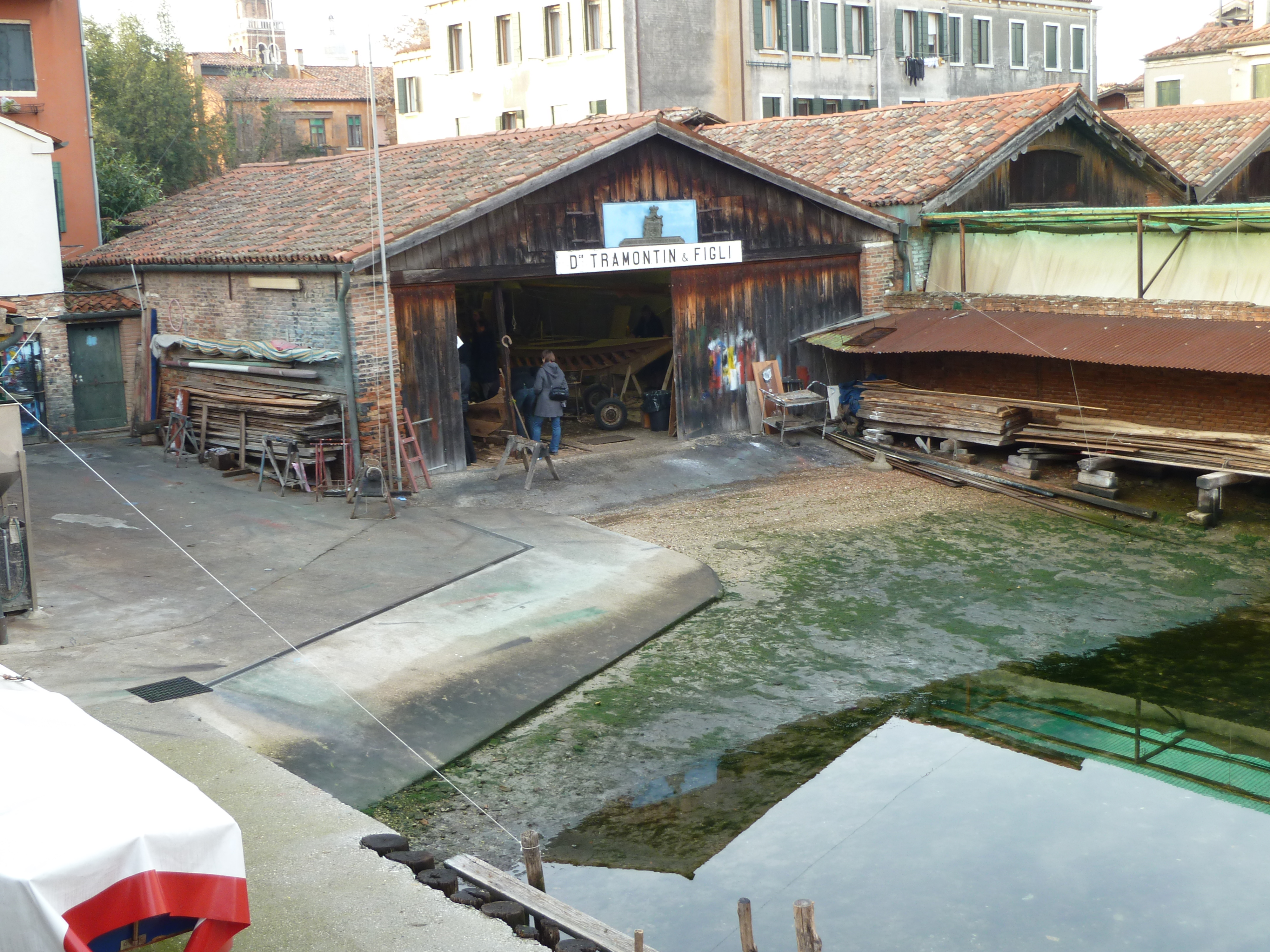 Rio dell'Avogaria (Venice)